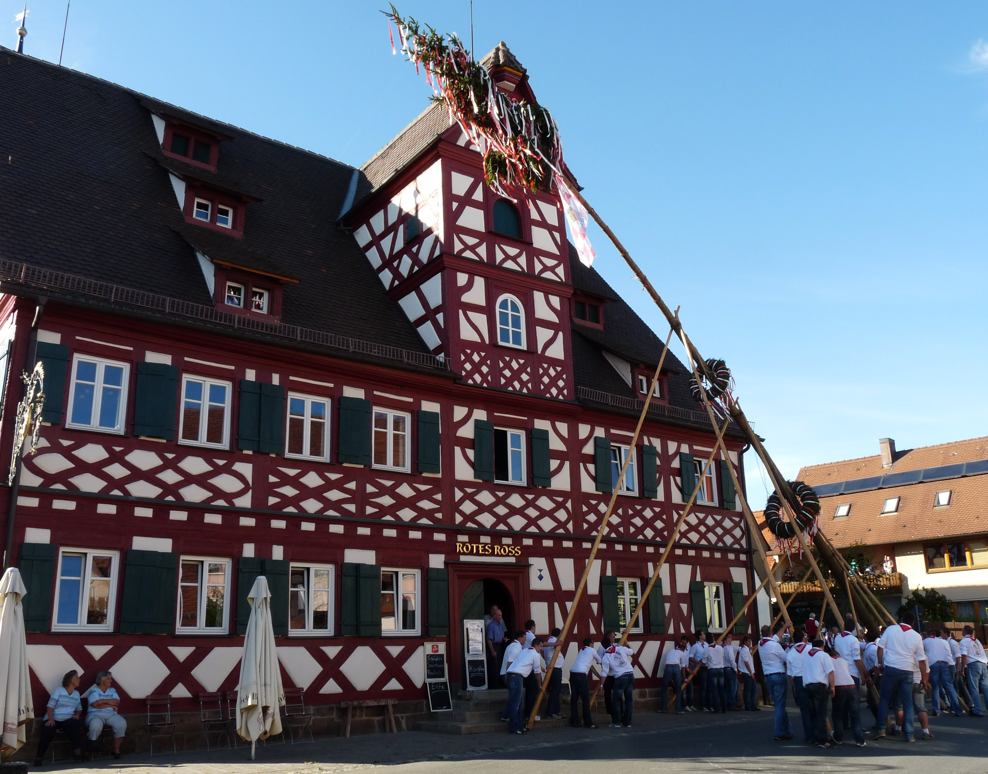 Das jetzt im Besitz der Gastwirtsfamilie Lang befindliche, im Jahr 2009 mit großem Aufwand restaurierte Fachwerkhaus war schon früher ein markgräfliches Gasthaus "Zum Roten Roß". Es wurde 1444 erbaut und ist im Dreißigjährigen Krieg abgebrannt. Ein Wirt ließ es Mitte des 17. Jahrhunderts wieder errichten. Innen wie außen ein sehenswertes Schmuckkästchen - eines der schönsten Fachwerkhäuser Frankens. Das Bild zeigt den fränkischen Brauch des Kärwabaum-Aufstellens während der Kirchweih 2011.